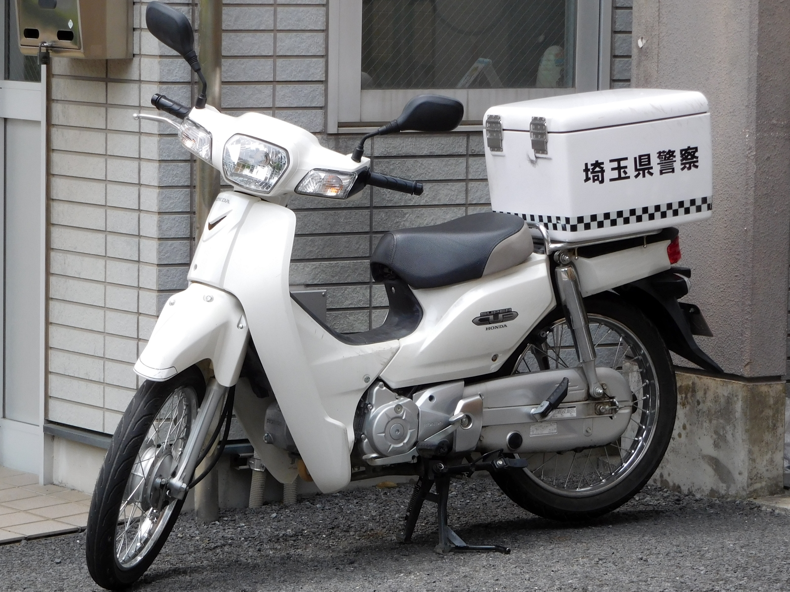 埼玉県警のスーパーカブ110